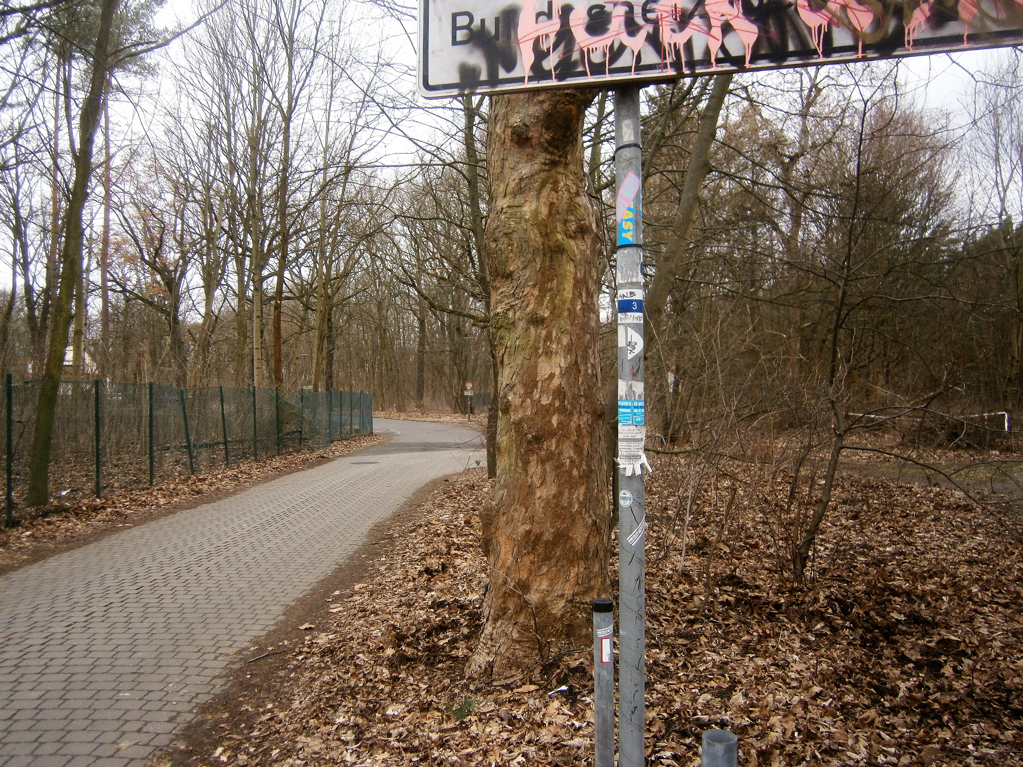 Der Schwarze-Graben-Kanal liegt vor dem Flughafensee verrohrt zunächst parallel zur Seidelstraße. In Tegel-Süd führt der Heiligenseer Weg an ihm entlang, einer der 20 Grünen Hauptwege Berlins.